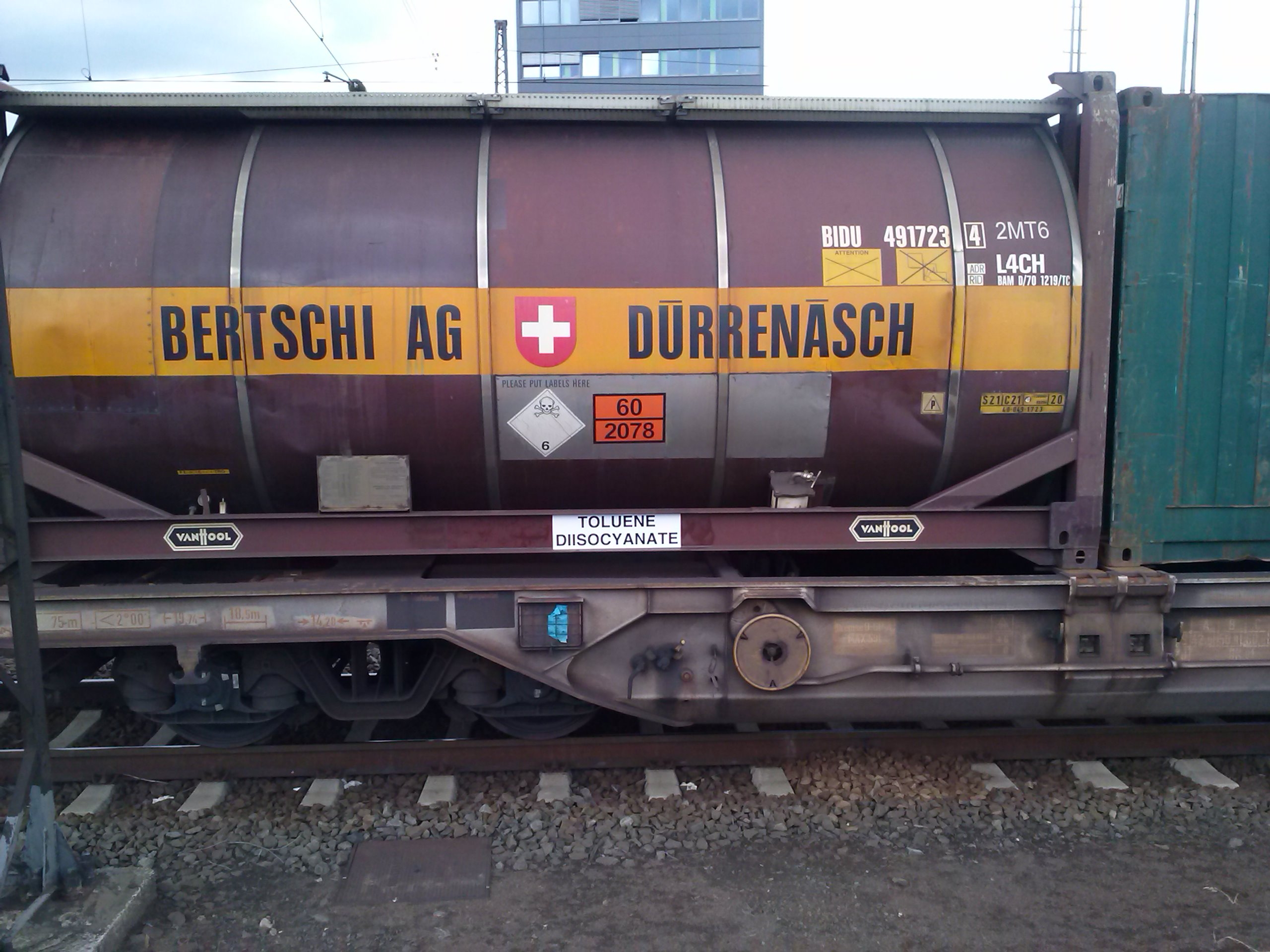 Tankcontainer mit Toluol-2,4-diisocyanat im Darmstädter Hauptbahnhof